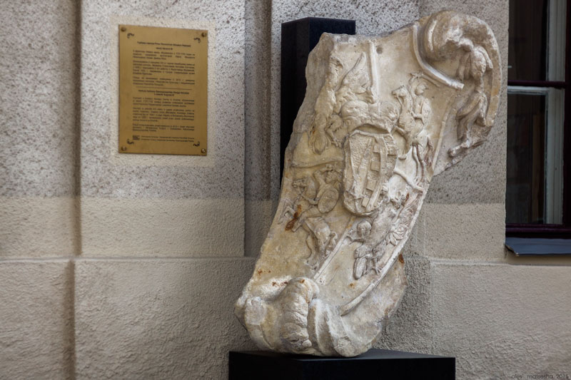 Гродна. Новы замак